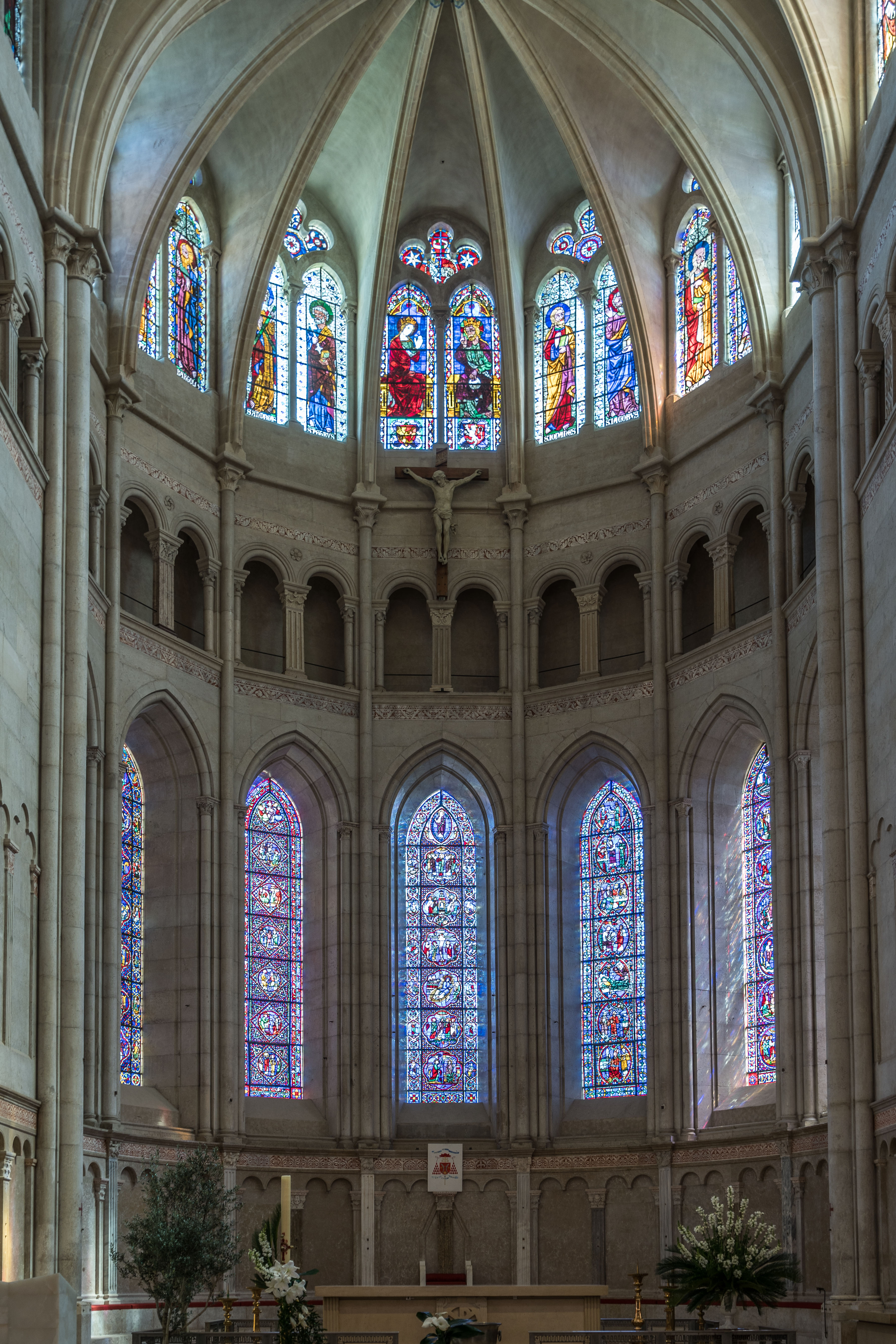 Lyon - Cathédrale Saint-Jean - Abside